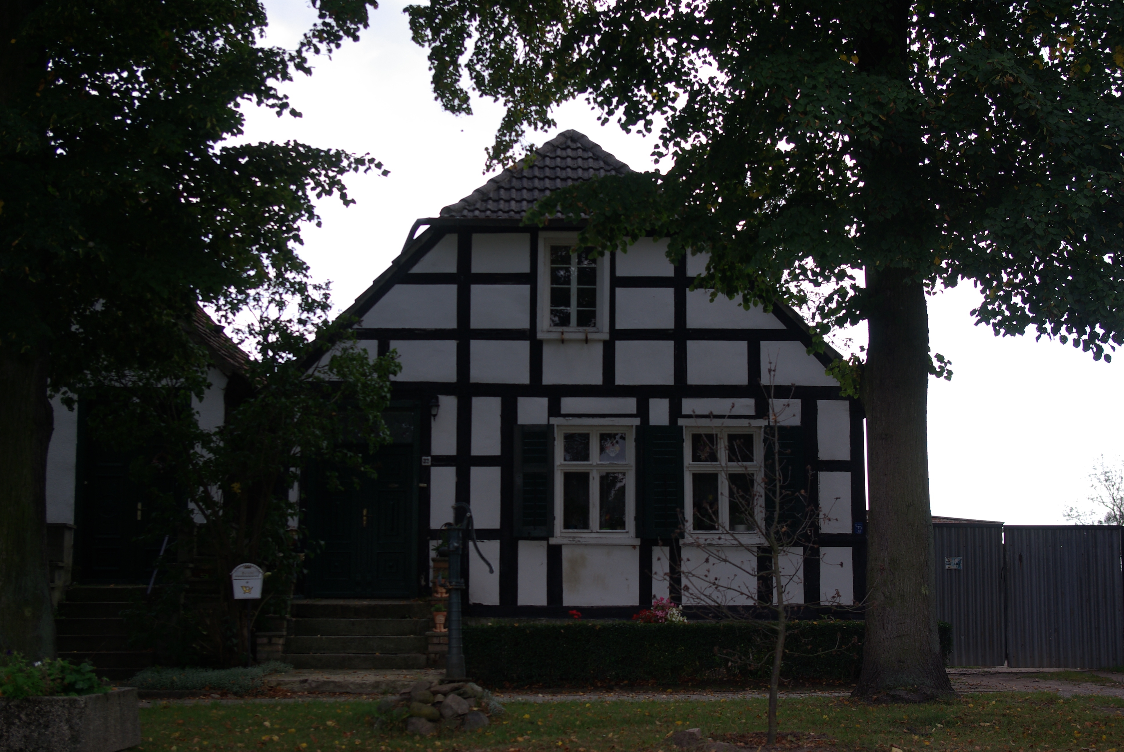 Wriezen in Brandenburg. Das Haus Eichwerder 32 im Ortsteil Eichwerder steht unter Denkmalschutz.